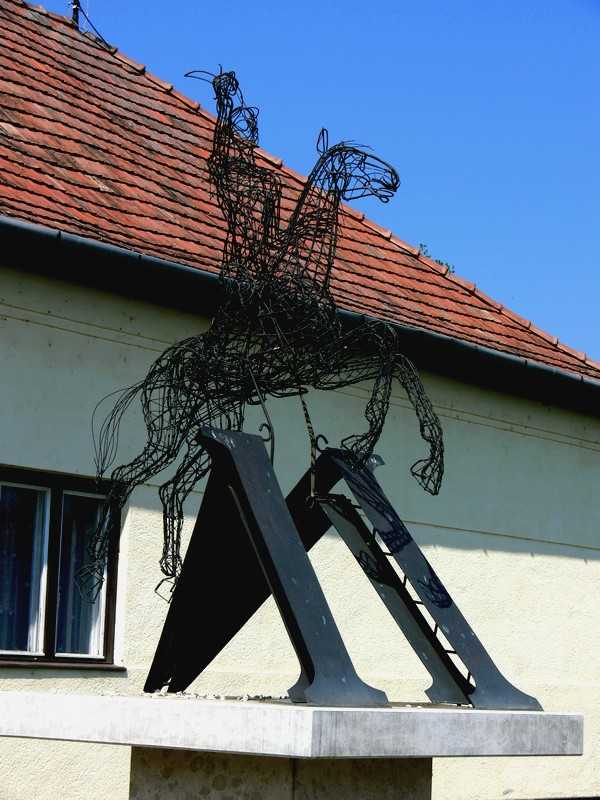 Csemniczky Zoltán: Milleniumi emlékmű, Püspökhatvan